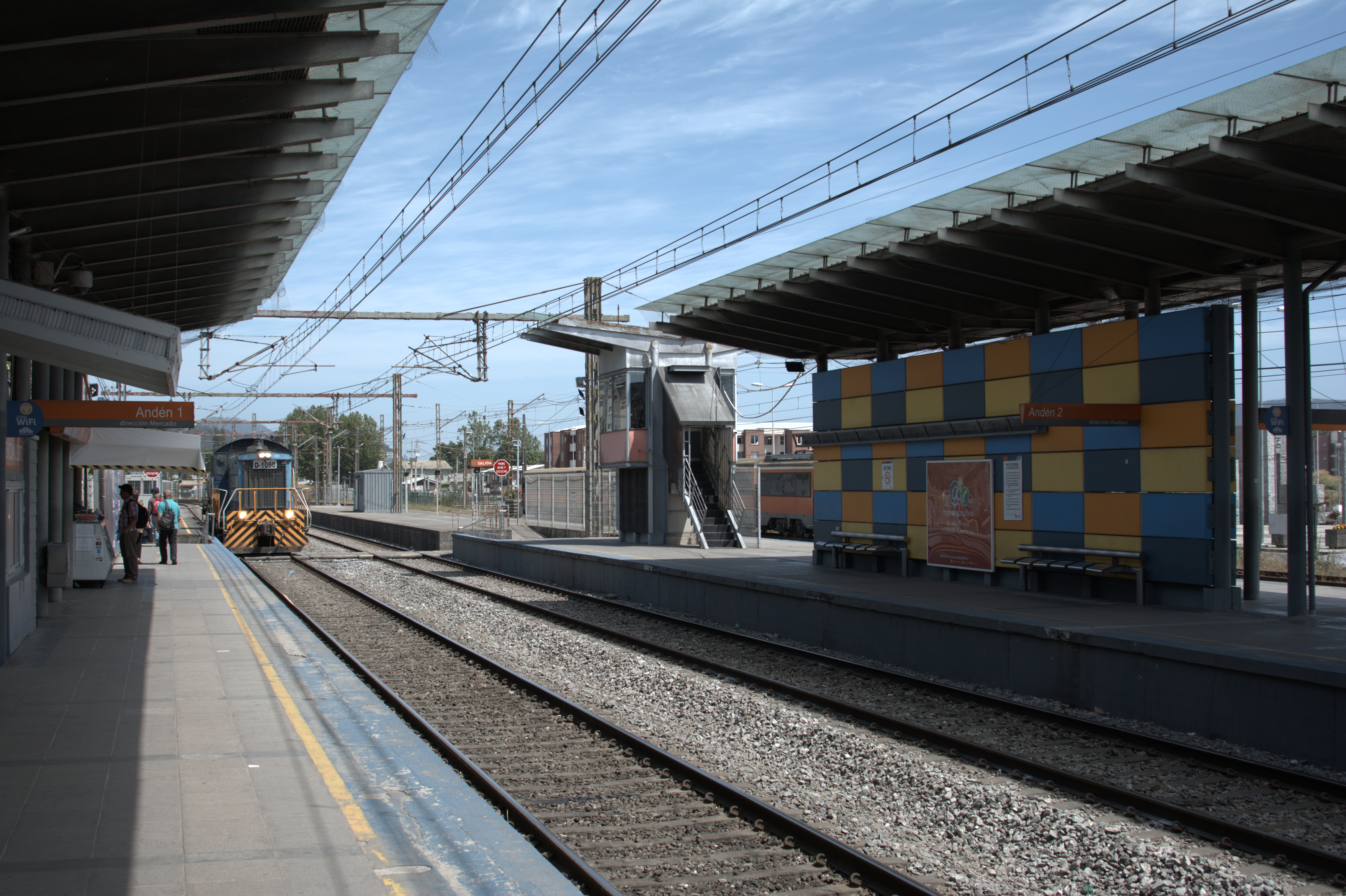 Estación Concepción, detalle de andén, con tren de carga en las proximidades. Concepción, diciembre de 2019